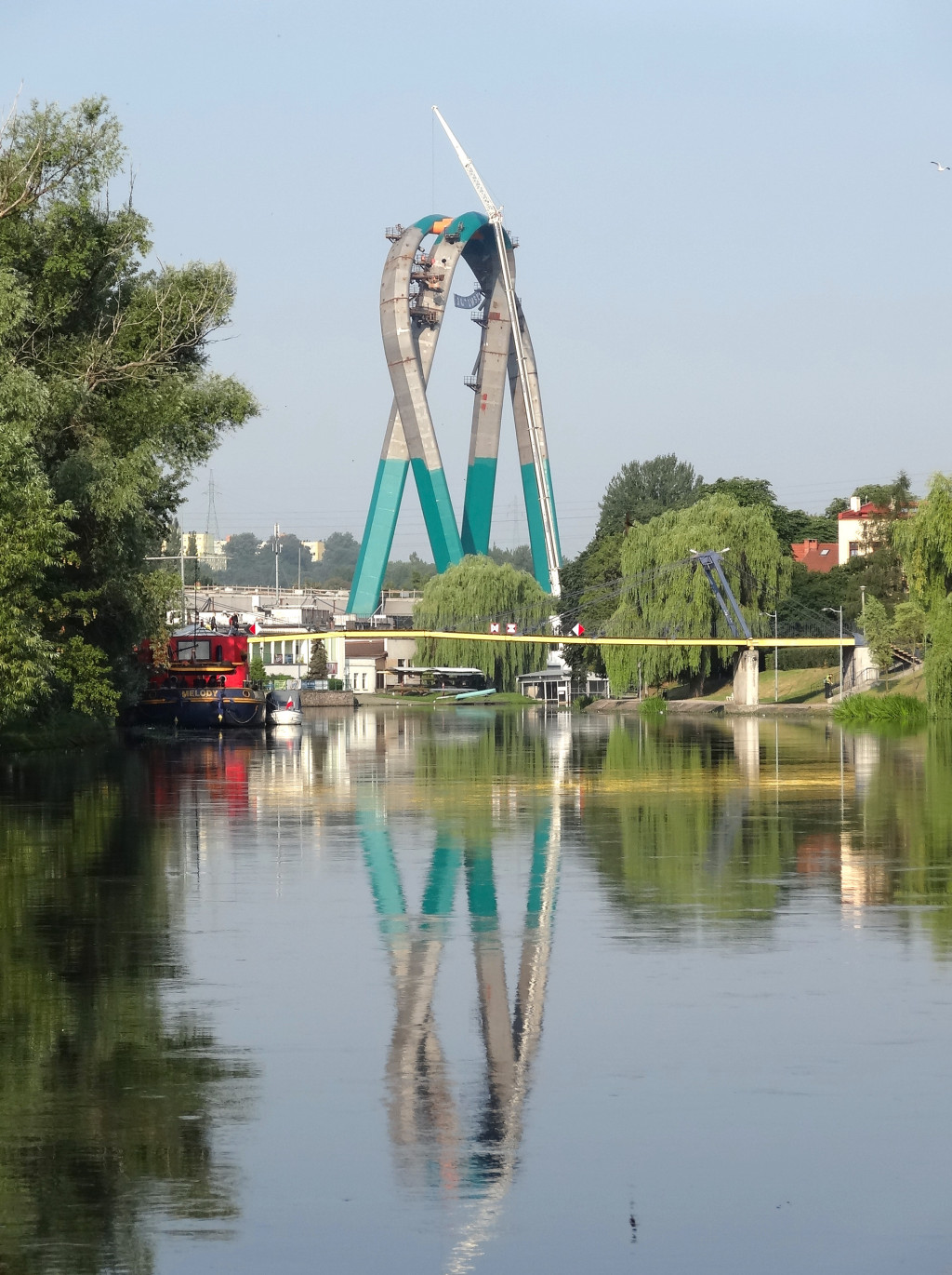 Pylon Trasy Uniwersyteckiej nad Brdą w Bydgoszczy